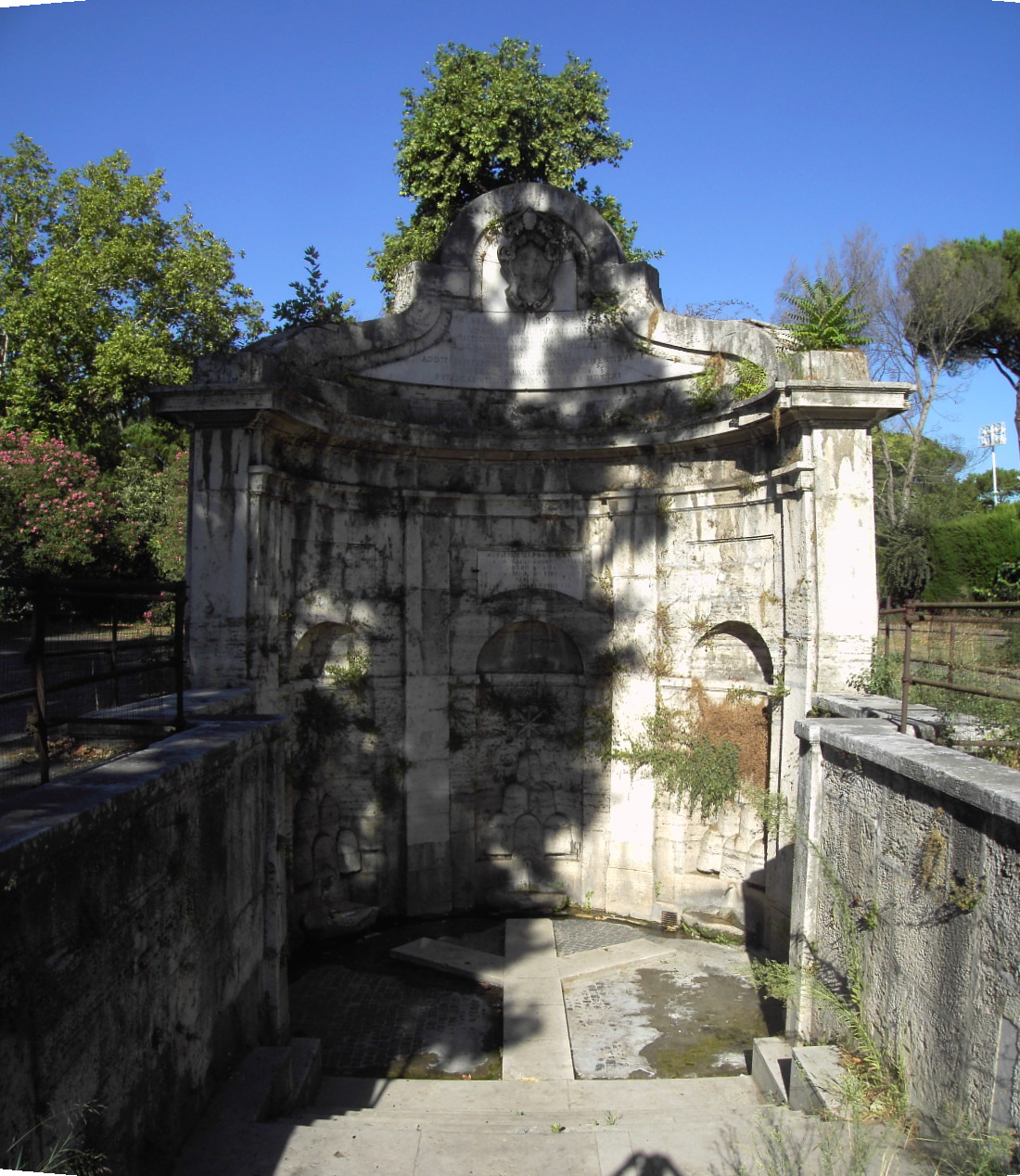 Roma, Fontana dell'Acqua Acetosa (su disegno di Gianlorenzo Bernini)